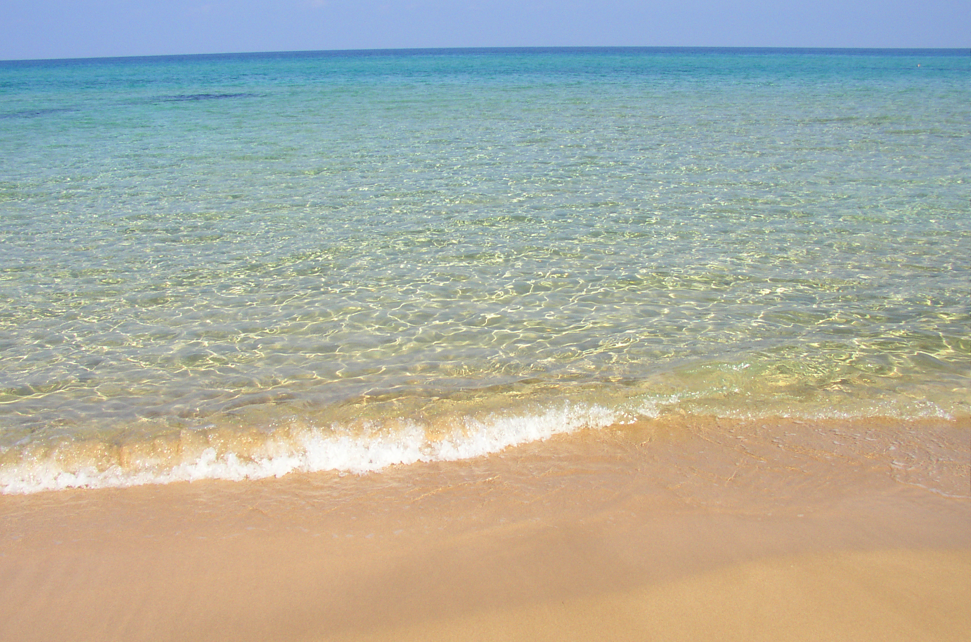 Municipal-Beach nähe Yeni Erenkoy (Nord Cypern)2003